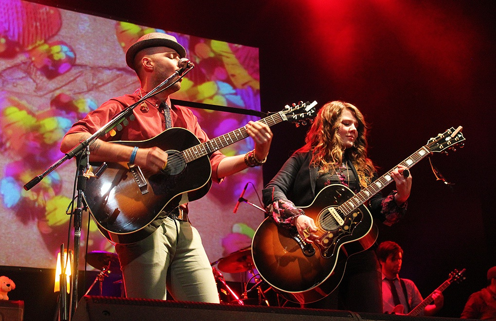 En concierto 2012